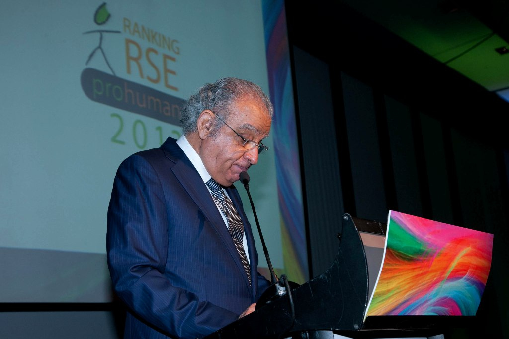 Jorge Awad, empresario chileno.